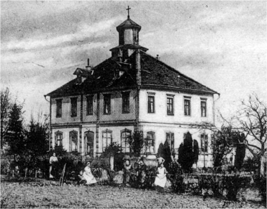 Das ab 1866 erbaute und geplante Jagschlösschen Großenritte, als Gertrudenstift ab 1877 als Diakonissenhaus des Gertrudenstiftes. 1972 abgerissen. Um 1910: Eingangsseite, davor Plege- und Stiftspersonal.